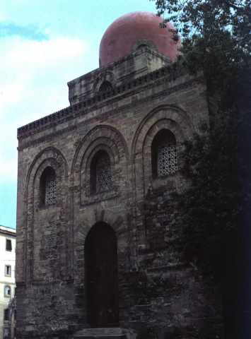 preso da La chiesa normanna di San Cataldo (Palermo), ricca di elementi architettonici arabi, fu forse realizzata su di una preesistente moschea.